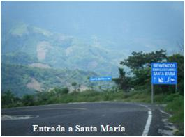 Entrada a Santa María Catzotipan